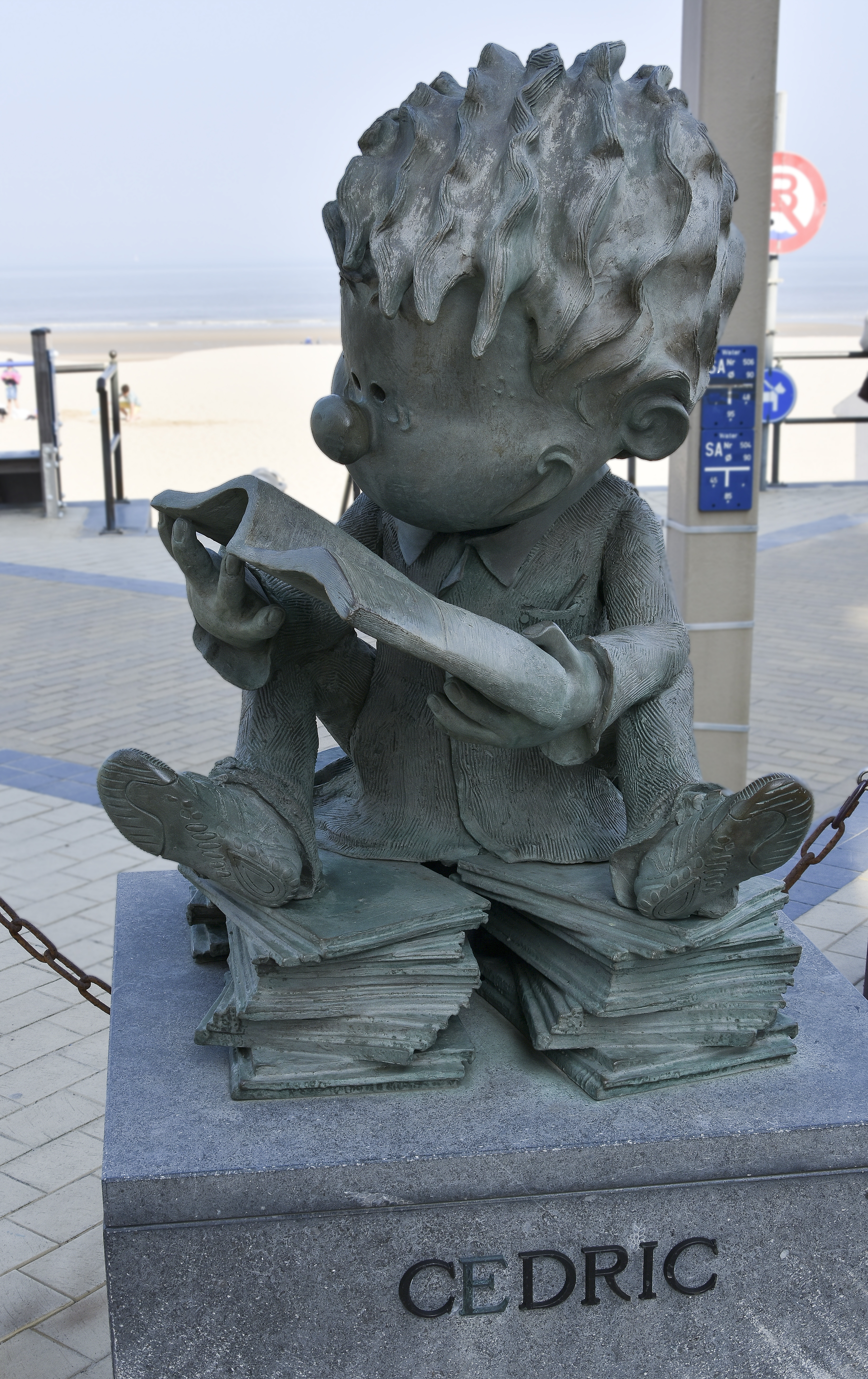 Jan Maillard - Nero - Stripstandbeelden Middelkerke